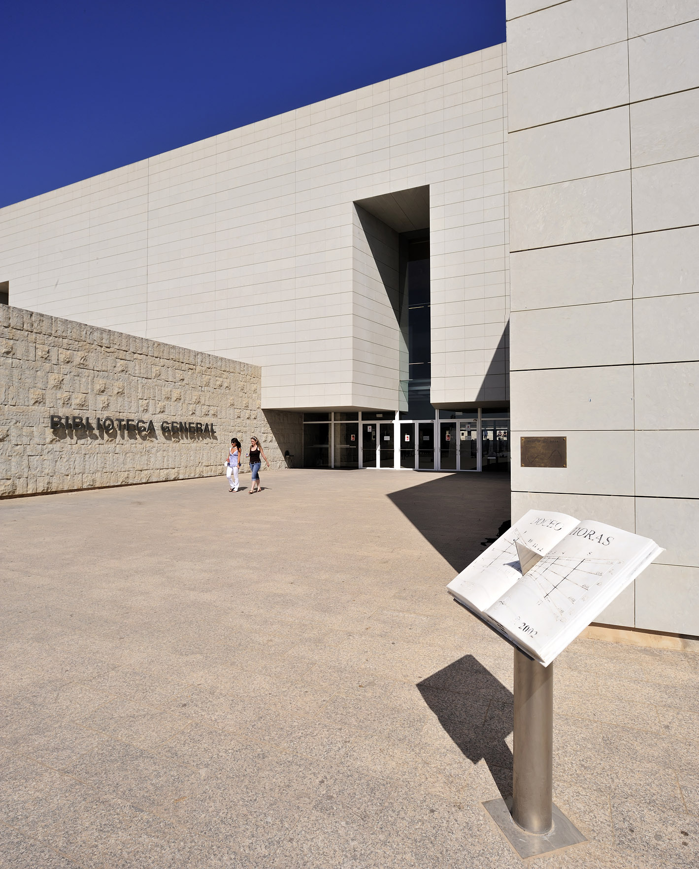 Espinardo, Murcia 2009